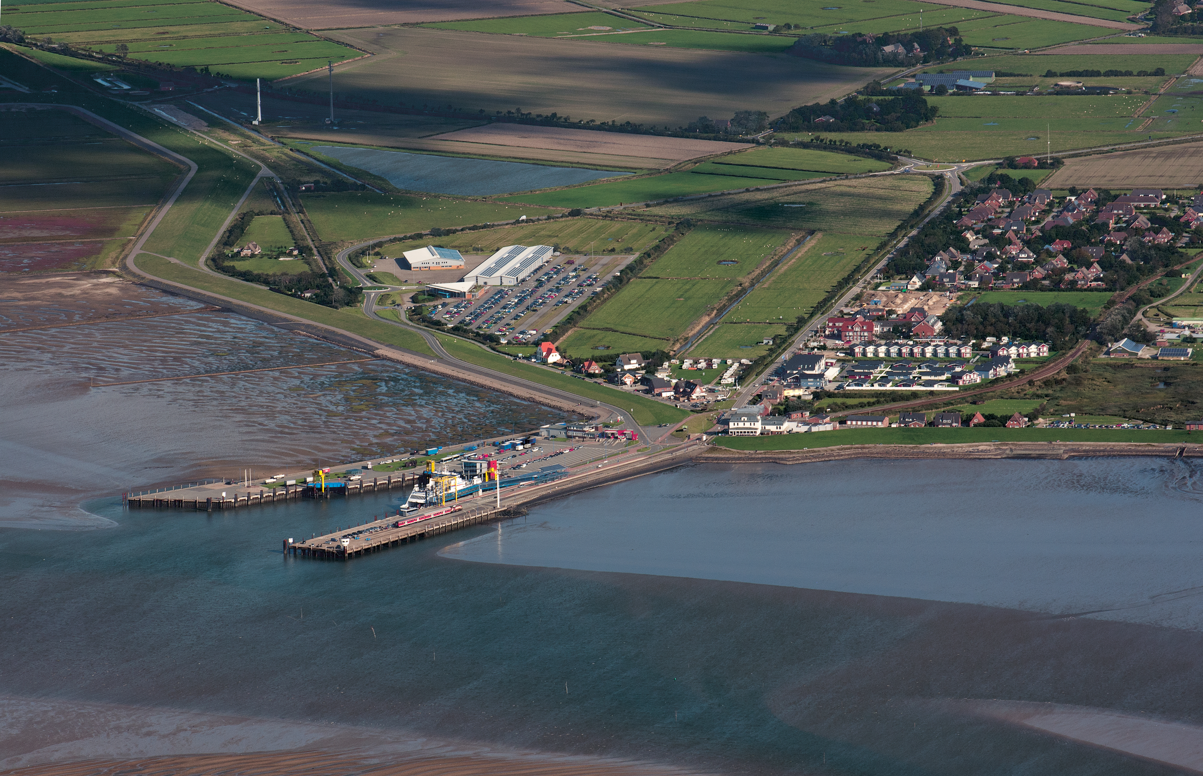 Fotoflug über das nordfriesische Wattenmeer. Fähranleger Dagebüll. Fähren nach Wittdün/Amrum und Wyk/Föhr.